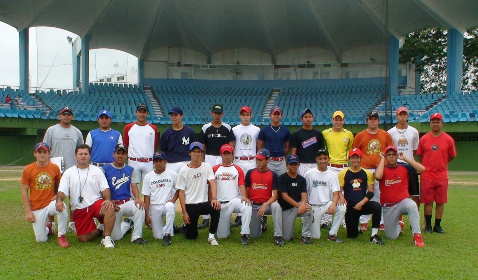 estadio de beisbol Yeyo Uraga